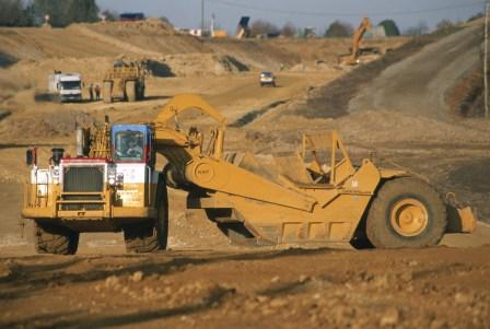 A28 Scrap